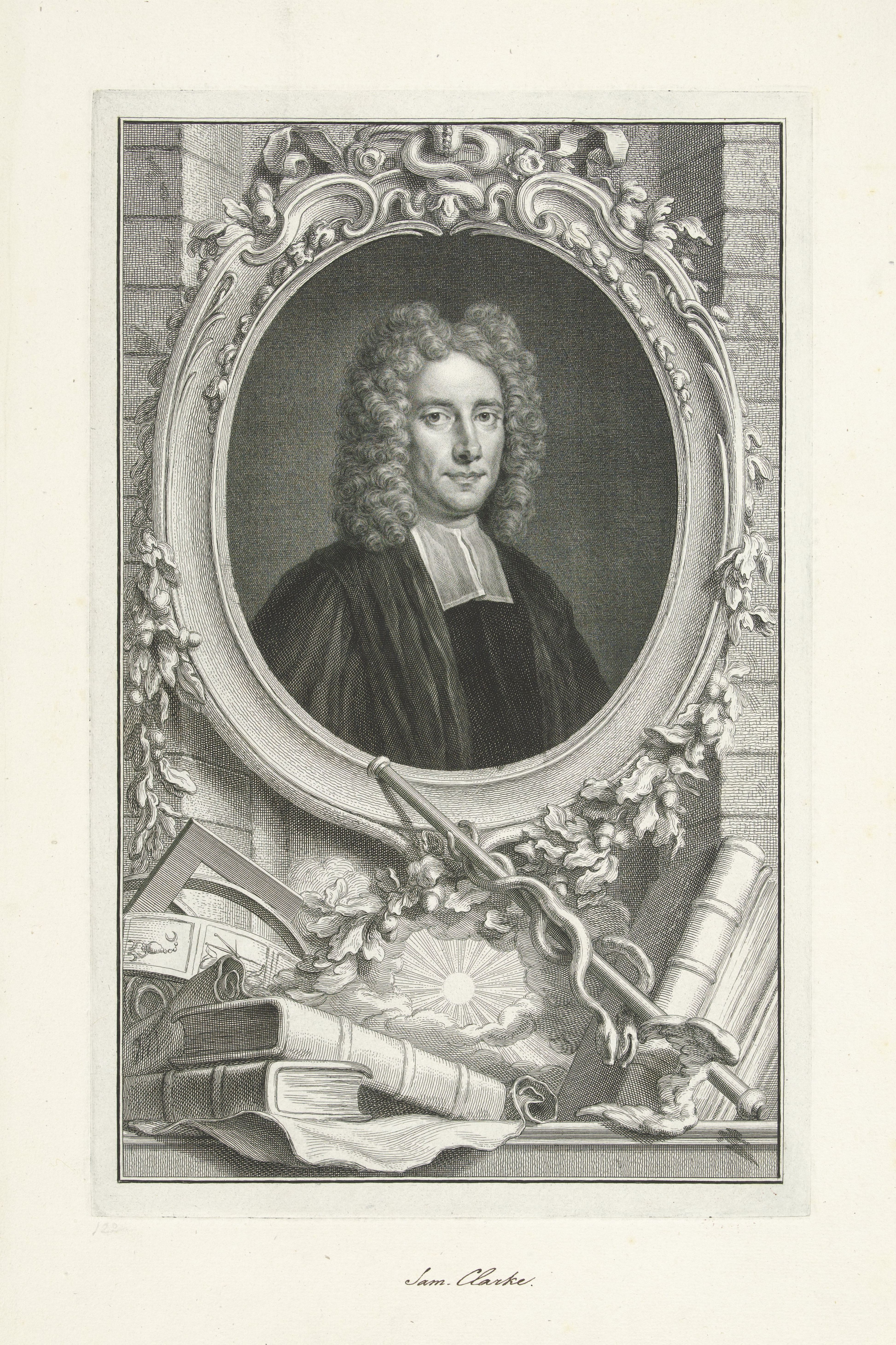 IdentificatieTitel(s): Portret van Samuel ClarkeObjecttype: prent Objectnummer: RP-P-OB-48.233Catalogusreferentie: Ver Huell 1071(2)Opmerking: 2 staten bekendOpschriften / Merken: verzamelaarsmerk, verso linksonder, gestempeld: Lugt 240naam, recto midden onder, handgeschreven: ‘Sam. Clarke’Omschrijving: Portret van de Engelse filosoof Samuel Clarke. Onder het portret een caduceus, boeken, een deel van een armillarium met de tekens van de dierenriem en een afbeelding van een zon die door een wolkendek heen schijnt.VervaardigingVervaardiger: prentmaker: Jacob Houbrakennaar schilderij van: GilsonPlaats vervaardiging: AmsterdamDatering: 1743Fysieke kenmerken: ets, gravure en pen; proefdrukMateriaal: papier Techniek: etsen / graveren (drukprocedé) / penAfmetingen: plaatrand: h 368 mm × b 235 mmToelichtingPrent ook gebruikt in: Thomas Birch. The heads of illustrious persons of Great Britain : engraved by Houbraken, and Vertue, with their lives and characters. London: John en Paul Knapton, 1743-1751.OnderwerpWat: armillary sphere, skeleton celestial globebookApollo and the Muses, Apollo MusagetesWie: Samuel ClarkeVerwerving en rechtenVerwerving: overdracht van beheer 1816Copyright: Publiek domein